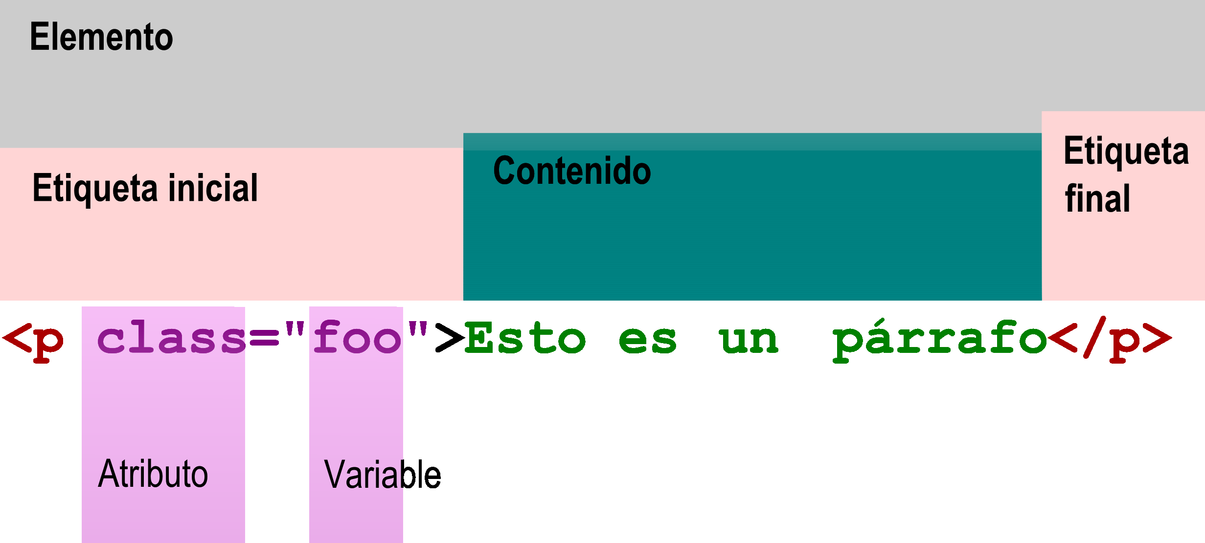 Esquema de una línea de código en el lenguaje de marcado HTML. El gráfico se ha diseñado usando Inkscape y exportado como archivo png con una resolución de 600ppp